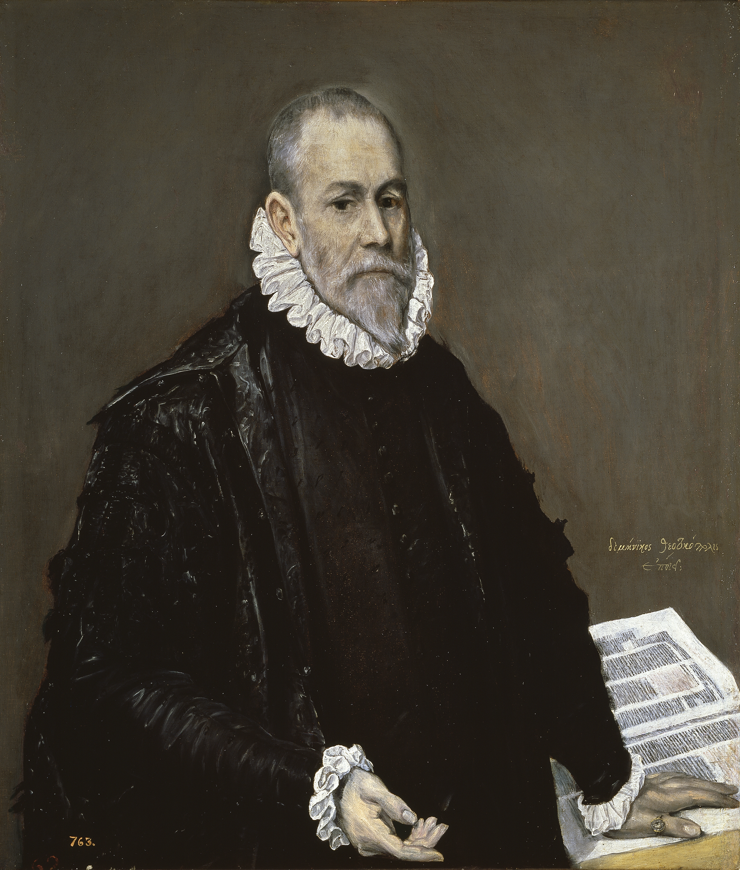 Esta obra, titulada Retrato de un médico, podría representar posiblemente, según algunos autores, al catedrático Luis Mercado o al doctor Rodrigo de la Fuente, que según Miguel de Cervantes era el médico más famoso de Toledo. Según otros autores podría tratarse del humanista Gómez Pereira, aunque la mayoría se decantan más por el doctor Rodrigo de la Fuente). En todo caso se reconoce que es un médico por el anillo que lleva, indicativo de su profesión, y porque posa su mano sobre un libro, cosa común en los médicos españoles del siglo XVI.